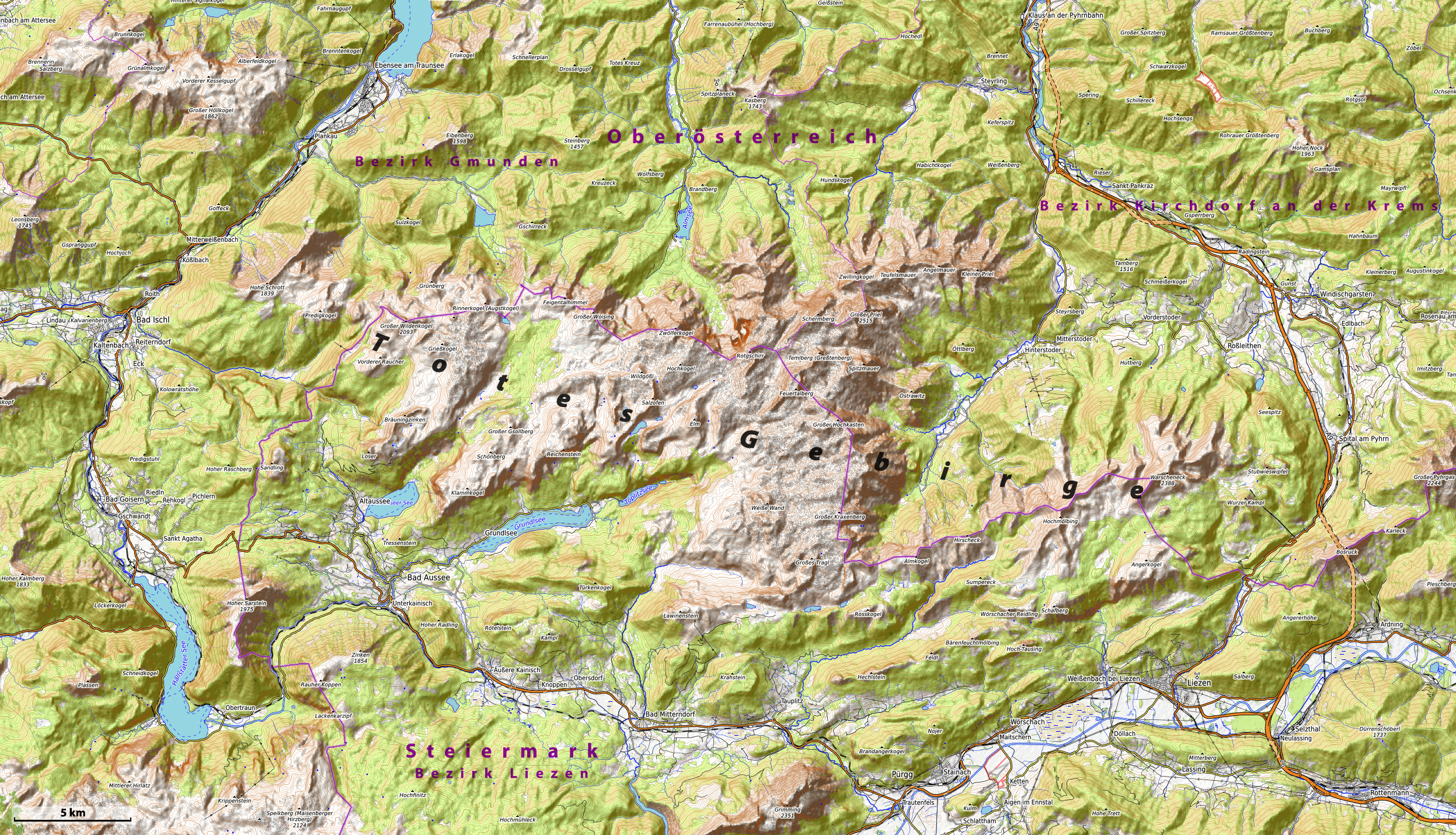 Karte des Toten Gebirges in Österreich